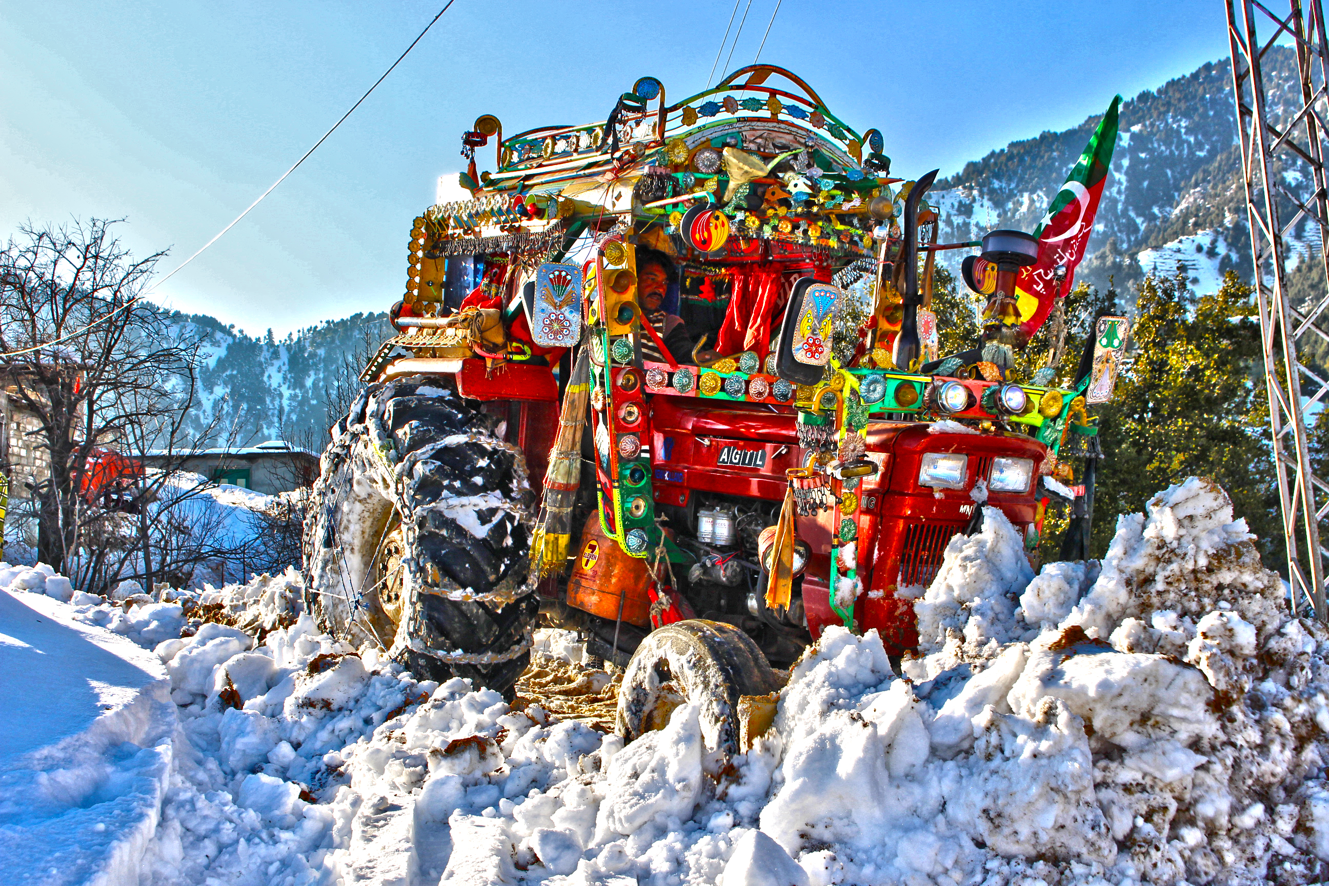 قلاگے سوات جہاں سرما میں ہر طرف برف ہی برف نظر آتی ہے۔۔ ہم نے سرما کے موسم میں یہاں تصویریں کھنچیں اور مقامی مہمان نوازی سے لطف اٹھایا۔